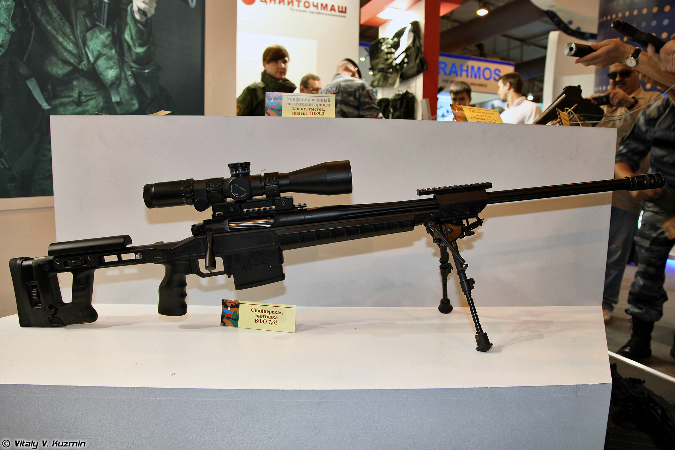 Снайперская винтовка ORSIS T-5000, для участия в испытаниях получила наименование ВФО 7,62 (ORSIS T-5000 sniper rifle, fot state tests received the designation VPhO 7,62)